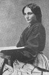 Laura Beatrice Mancini Oliva (1821-1869), poetessa italiana